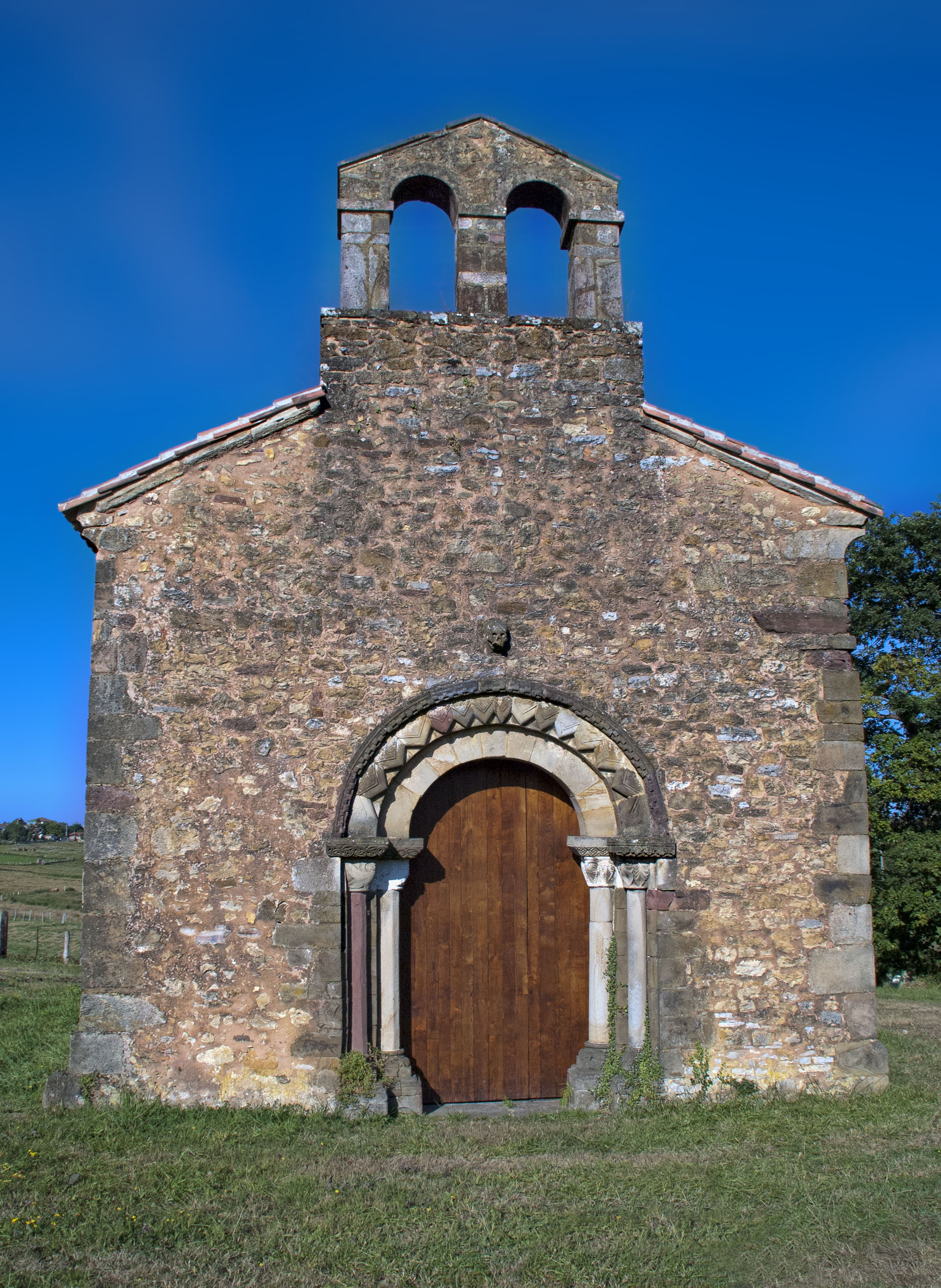 Puerta principal, orientada al Oeste; es de arco de medio punto con dos arquivoltas que se apoyan sobre columnas con fustes sobre basas adornadas con flores de lis. Los capiteles están decorados con motivos vegetales.